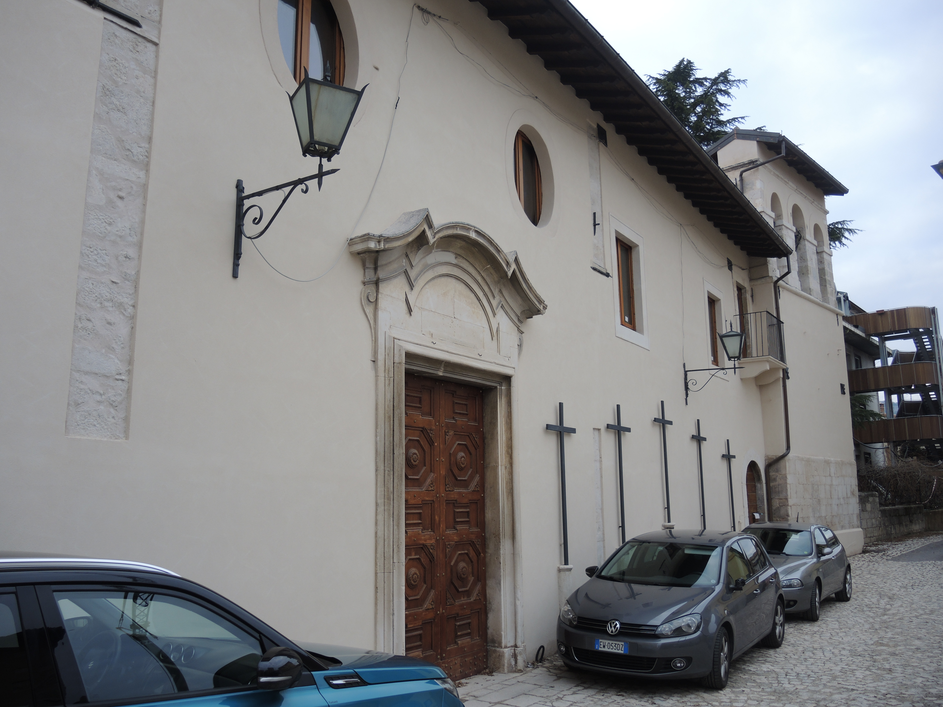 L'Aquila: Chiesa della Madonna dei Sette Dolori